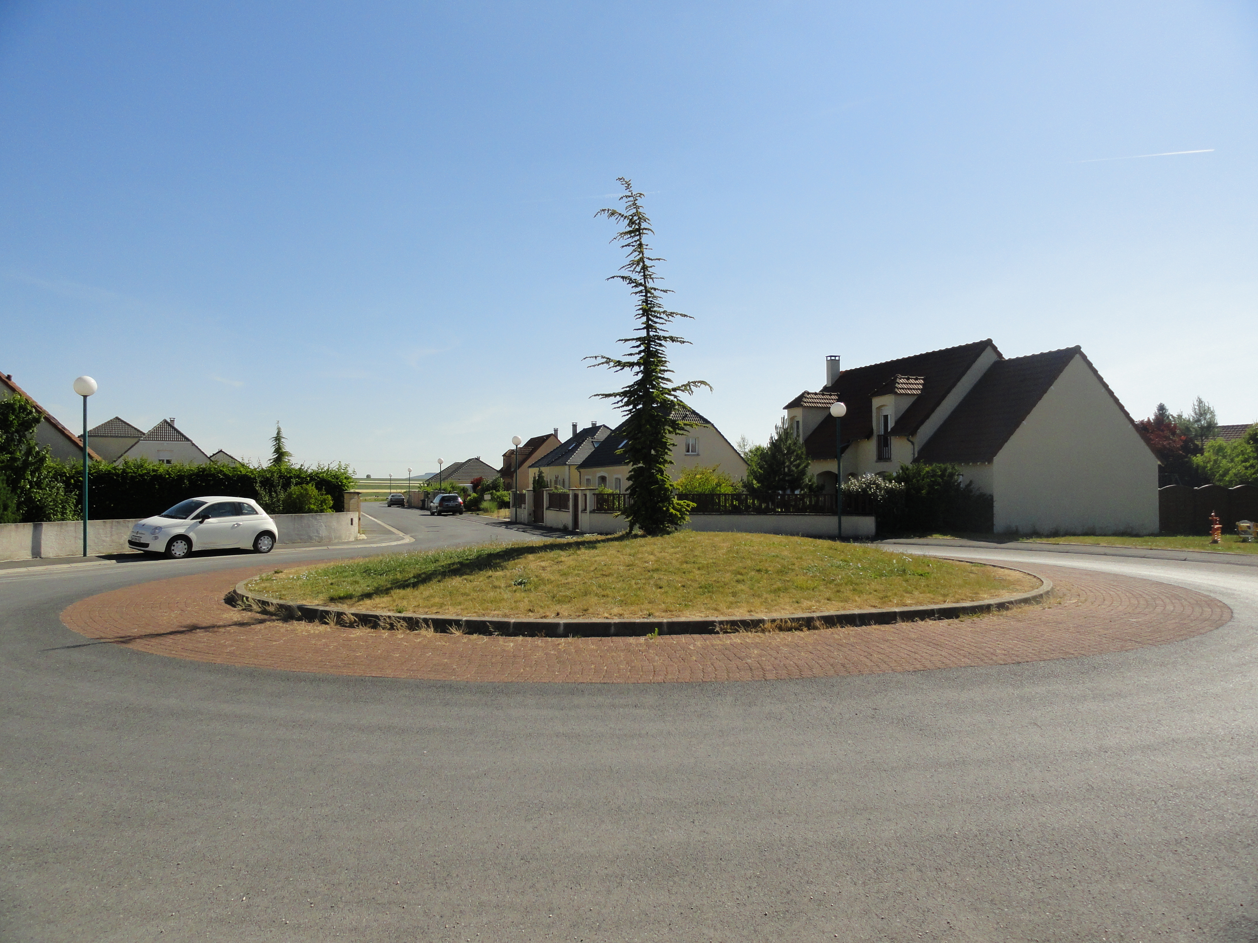 Nouveau quartier pavillonnaire à Plivot